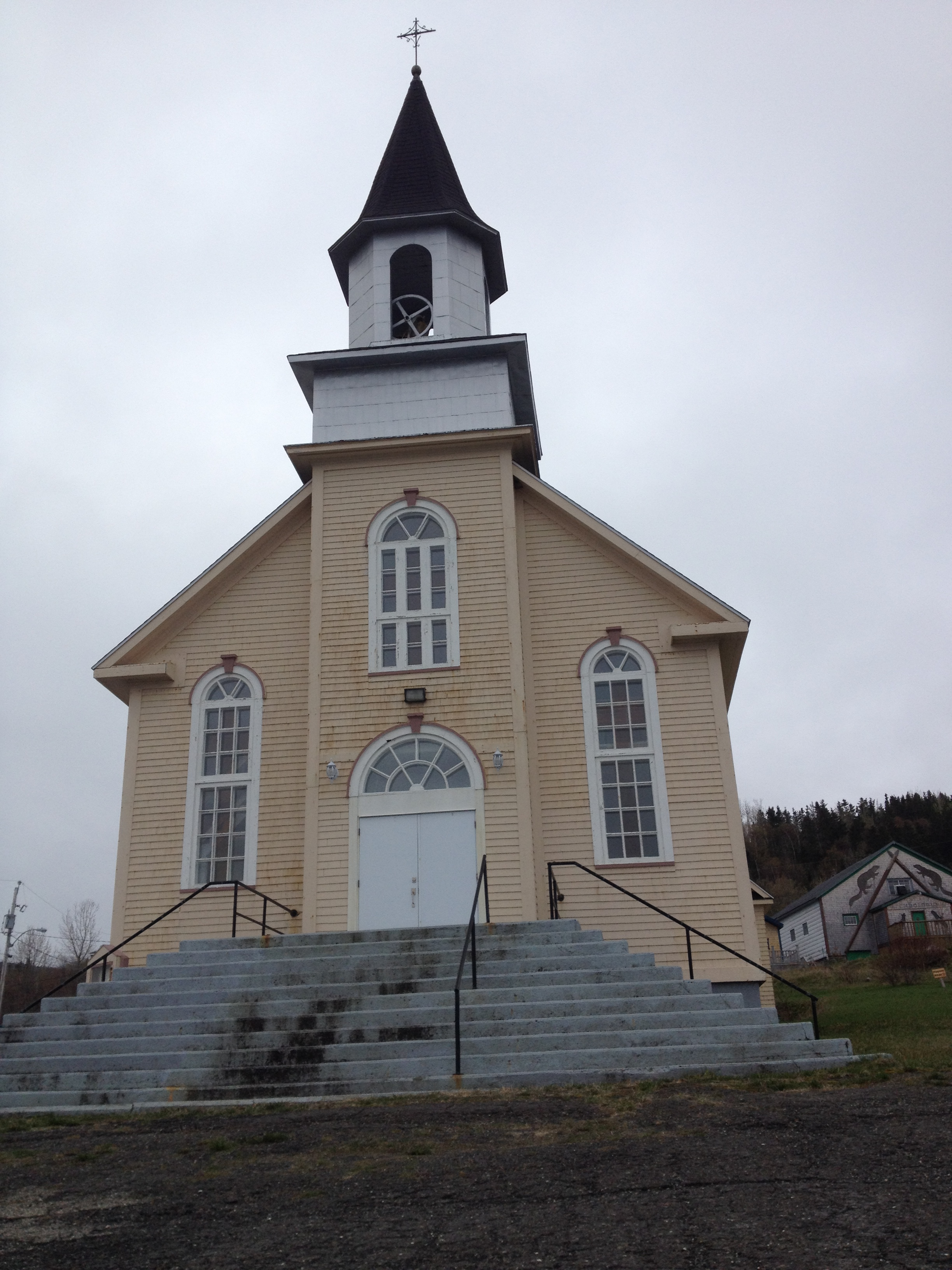 Église de La-Martre, Gaspésie, Québec, Canada